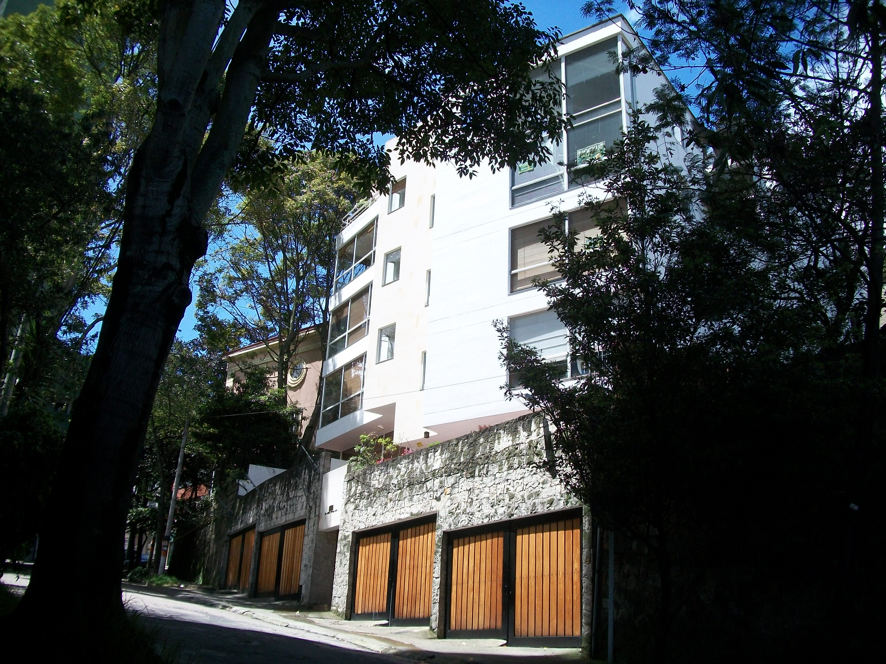 Edificio Casa Izquierdo, en el barrio Bosque Izquierdo, en la transversal 4A con calle 25B, en Bogotá.